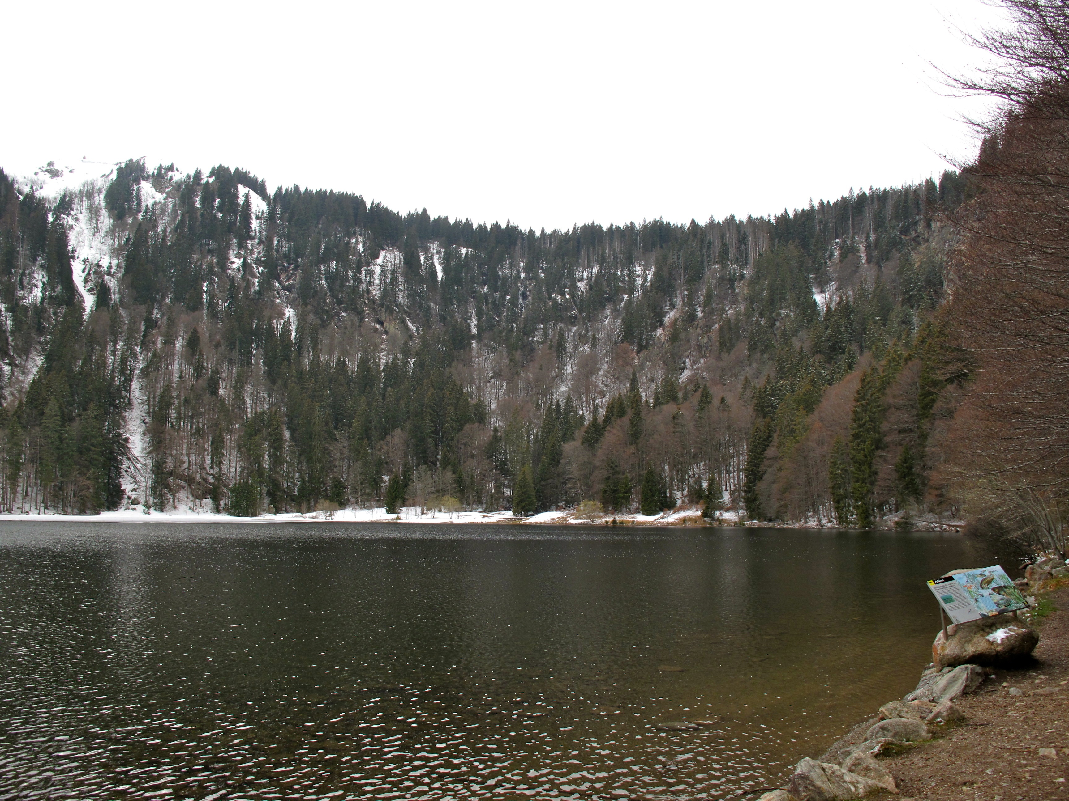 Feldsee gegen Ostern